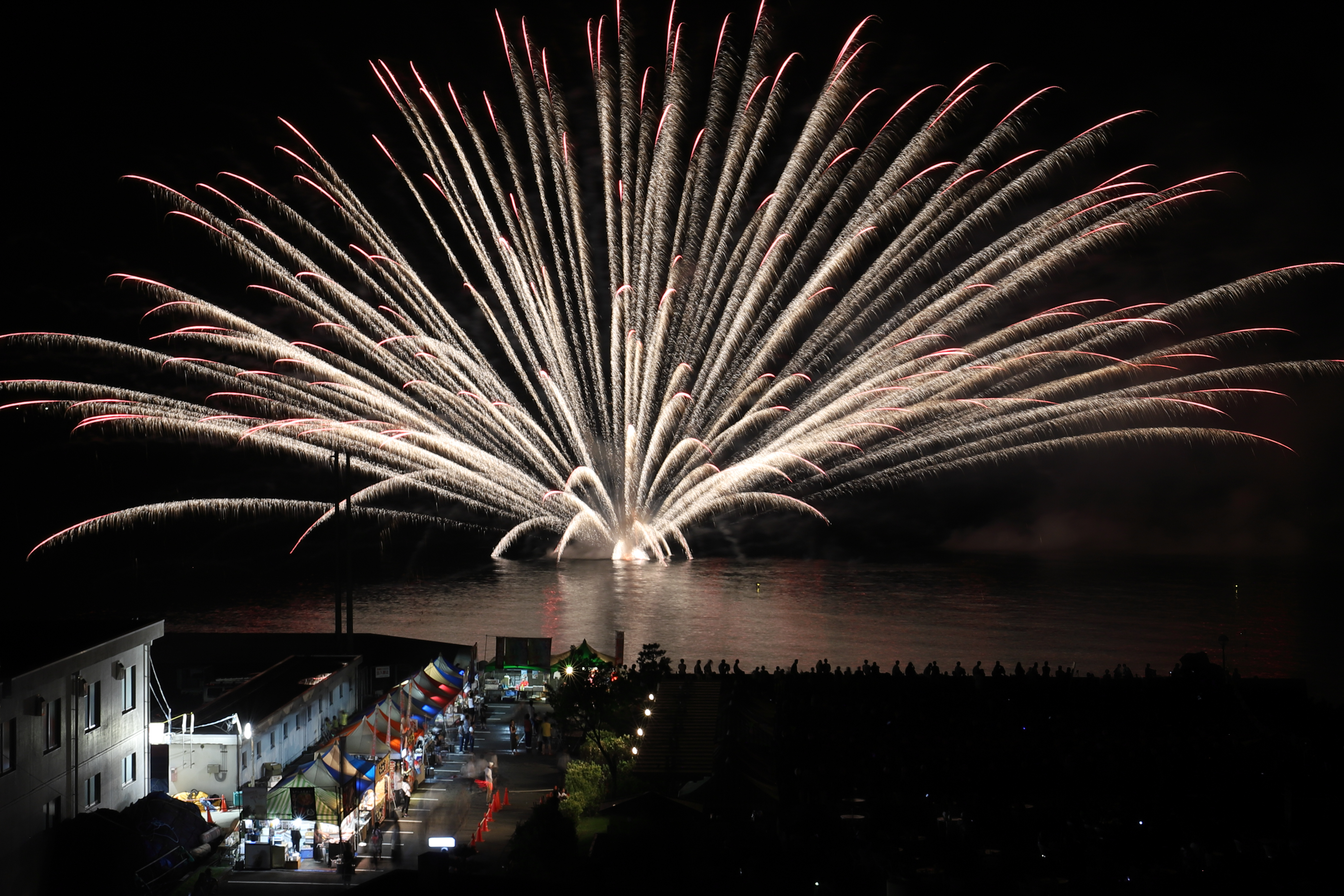 2019年 河野夏まつりの花火 2019年は台風の影響で1日順延した Canon EOS 6D Mark II